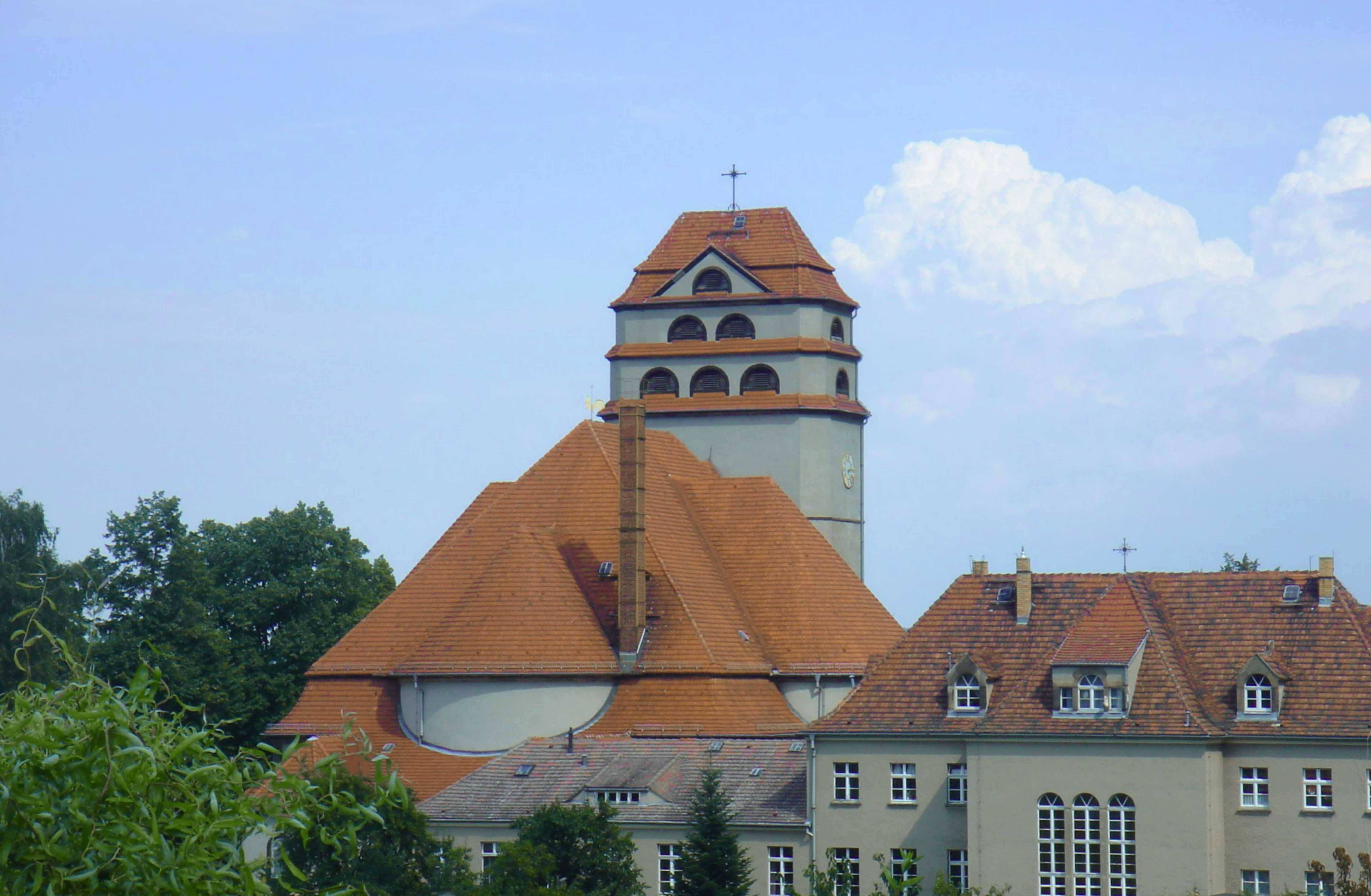 evangelische Heilandskirche in Dresden-Cotta, 1914–1928 von Rudolf Kolbe (mit angebautem Pfarrhaus, von der Gottfried-Keller-Straße aus gesehen)